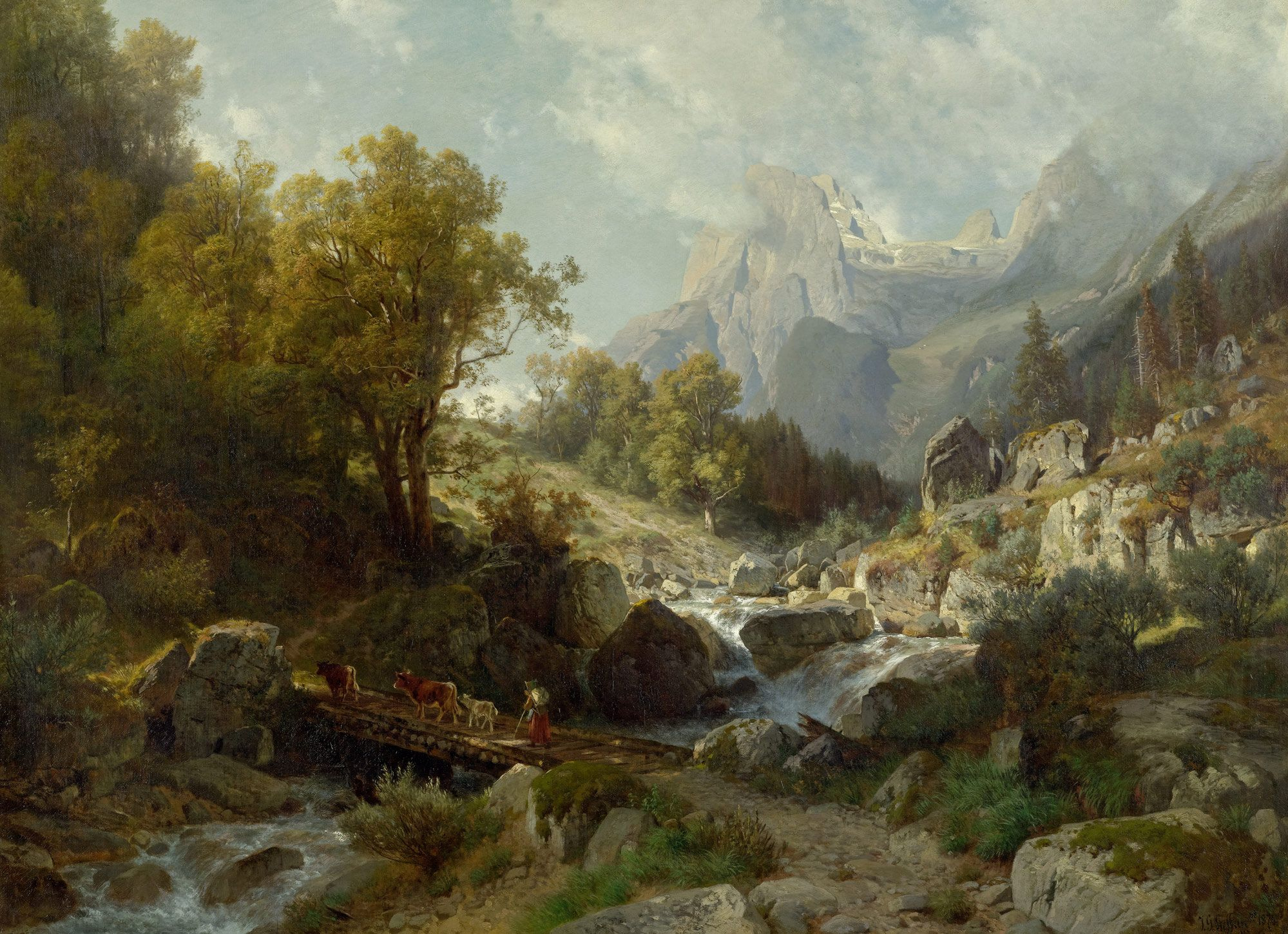 Motiv aus der Ramsau bei Berchtesgaden. Öl auf Leinwand. Unten rechts signiert, datiert und bezeichnet: J. G. Steffan. 1874. München. 82 x 115 cm.